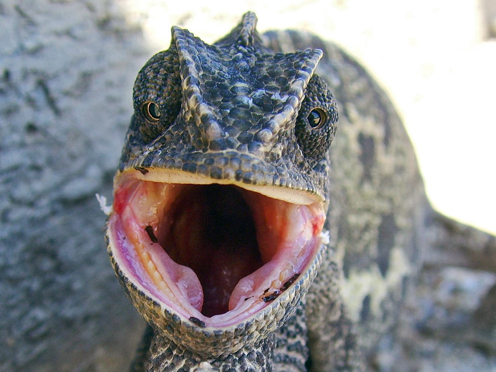 Gewöhnliches Chamäleon (Chamaeleo chamaeleon chamaeleon)